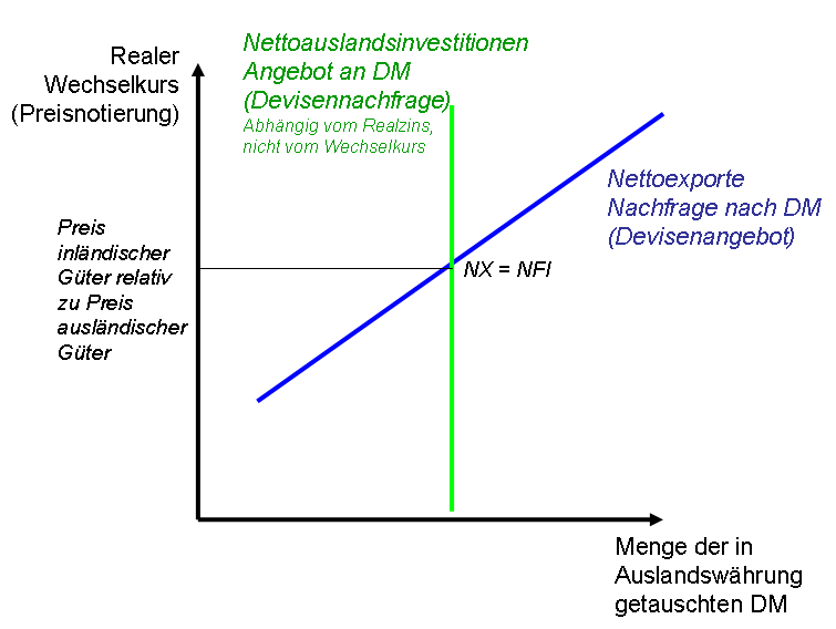 selbst erstellt, GNU-FDL